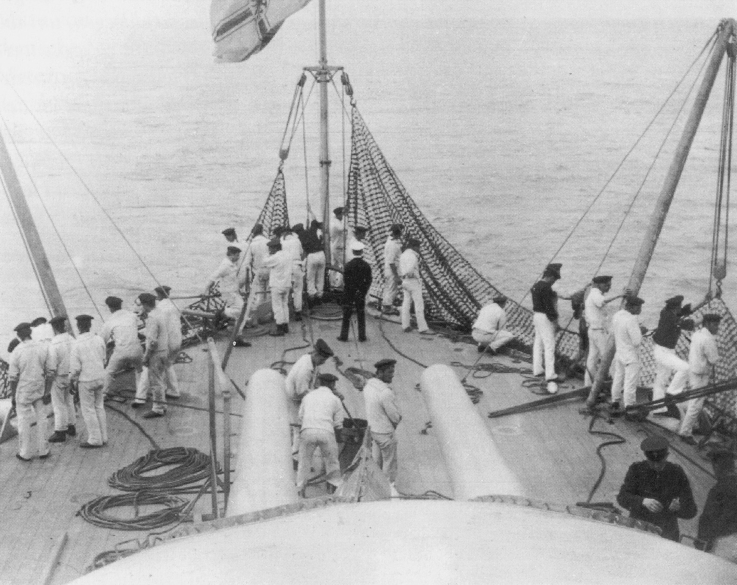 Das Torpedoschutznetz der SMS Weißenburg wird an Bord geholt.